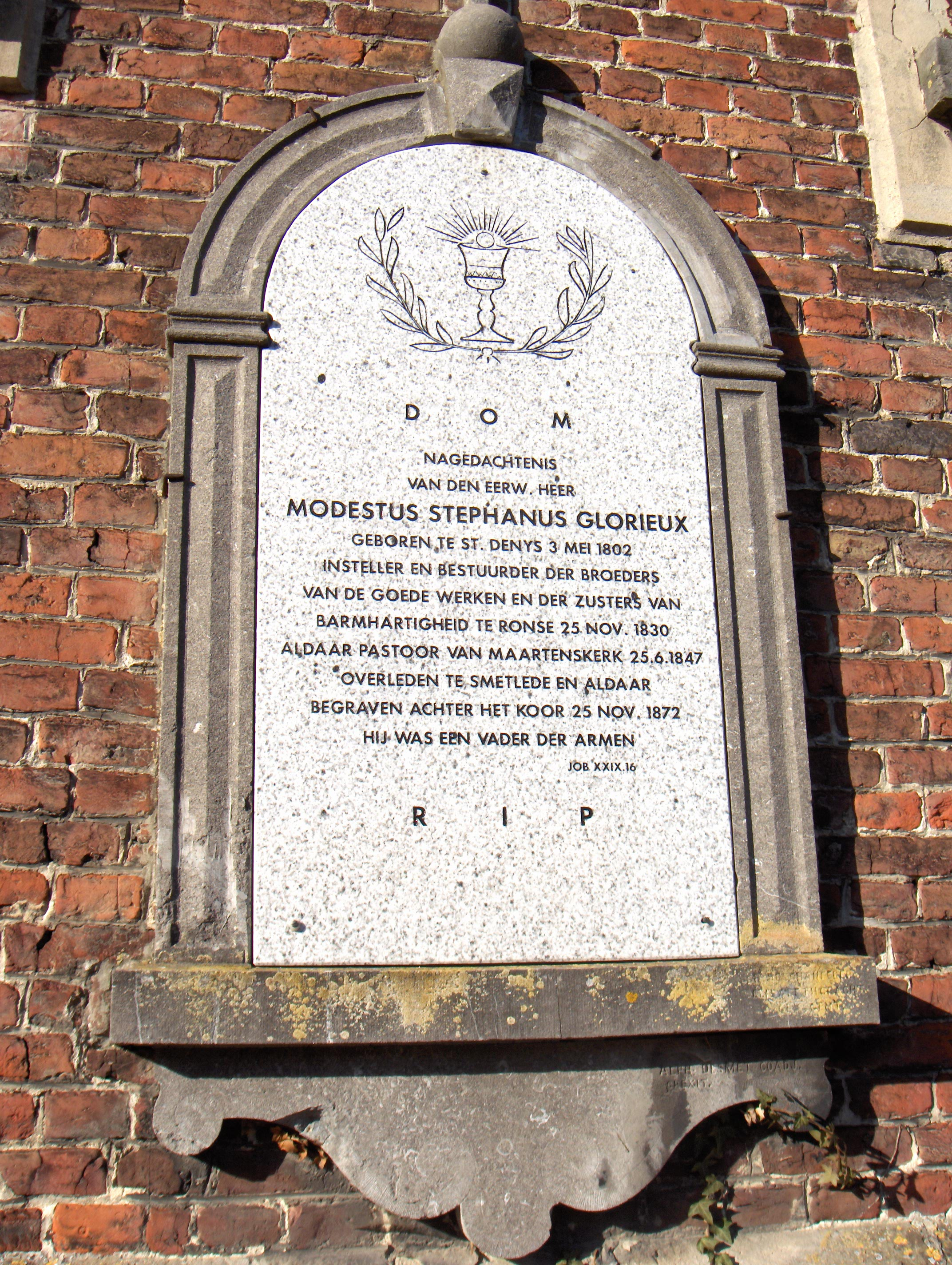 Grabmal des Priesters Modestus Glorieux (des Gründers der Kongregation der Schwestern der Barmherzigkeit) an der Kirchenmauer zu Smetlede (Ostflandern, Belgien)